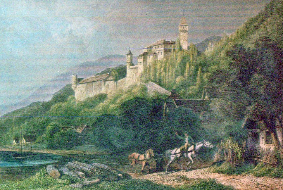 Zwingenberg am Neckar, Gouachierter Stahlstich